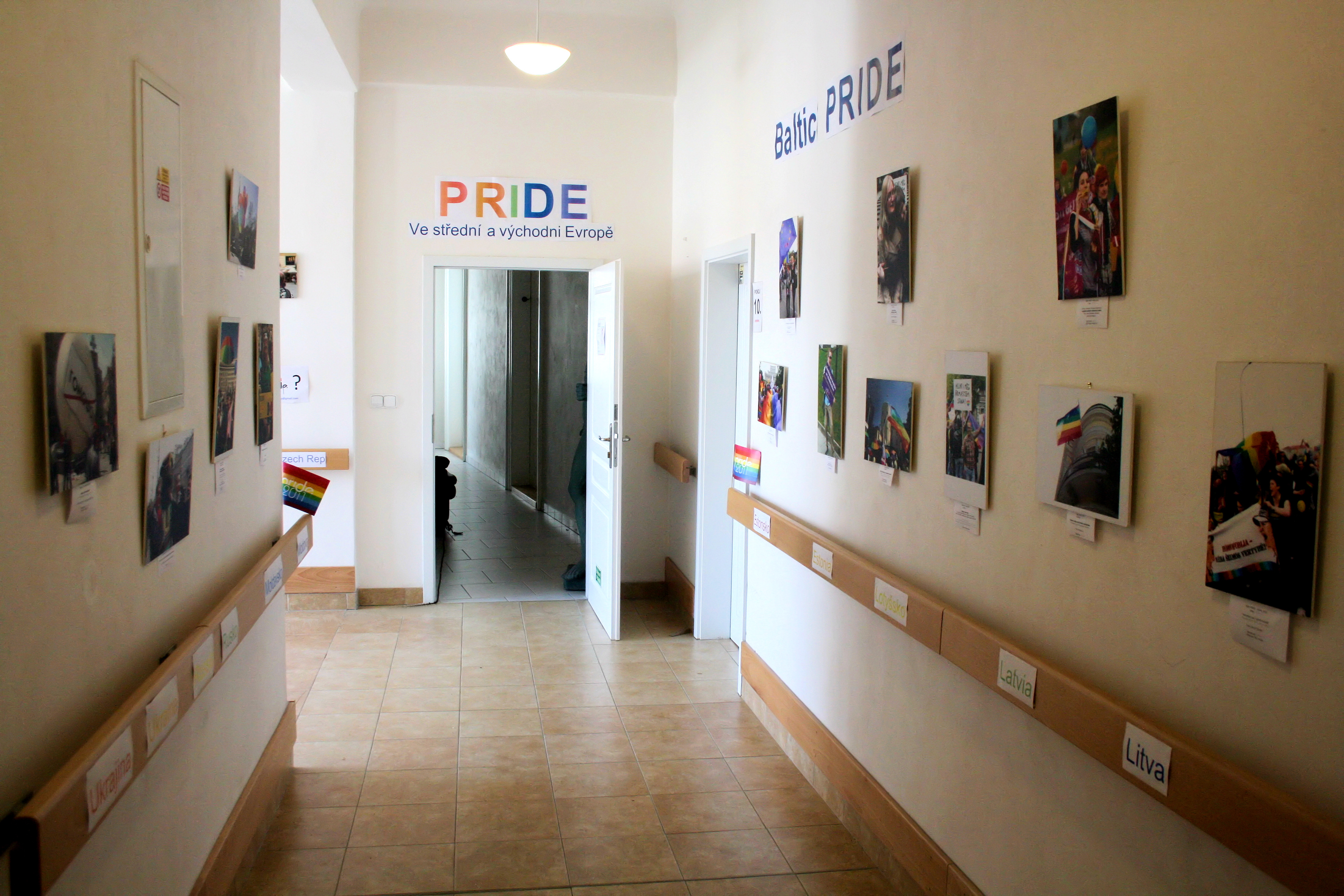 Výstava fotografií s názvem Pride ve střední a východní Evropě, uspořádaná v Domě světla, Malého 3, Praha při příležitosti festivalu tolerance Prague Pride 2011.